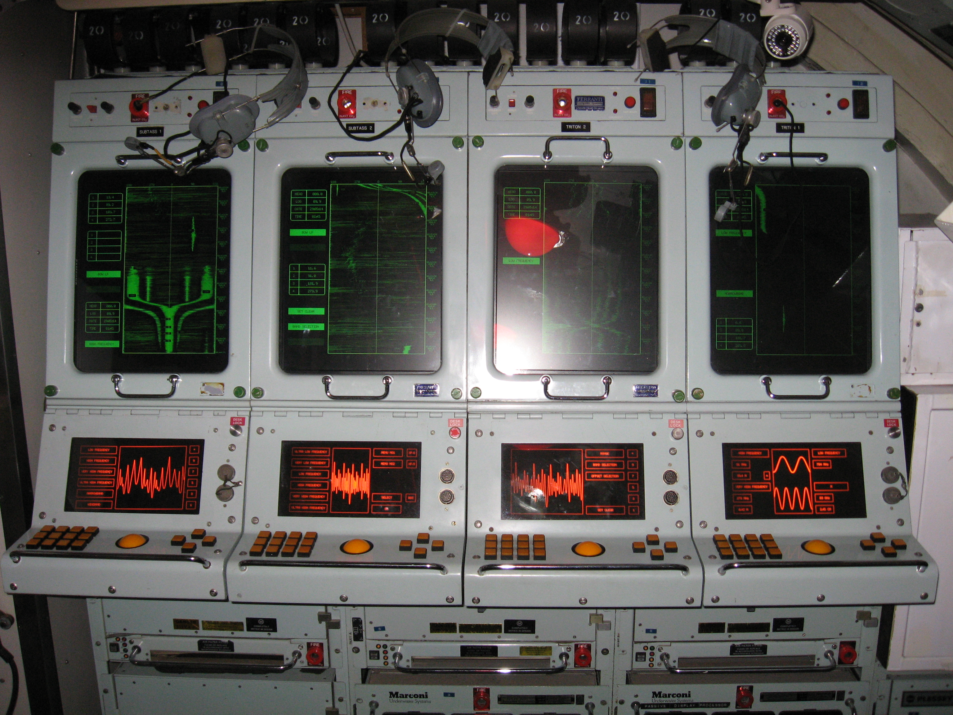 Système de contrôle sonar du NCSM Onondaga